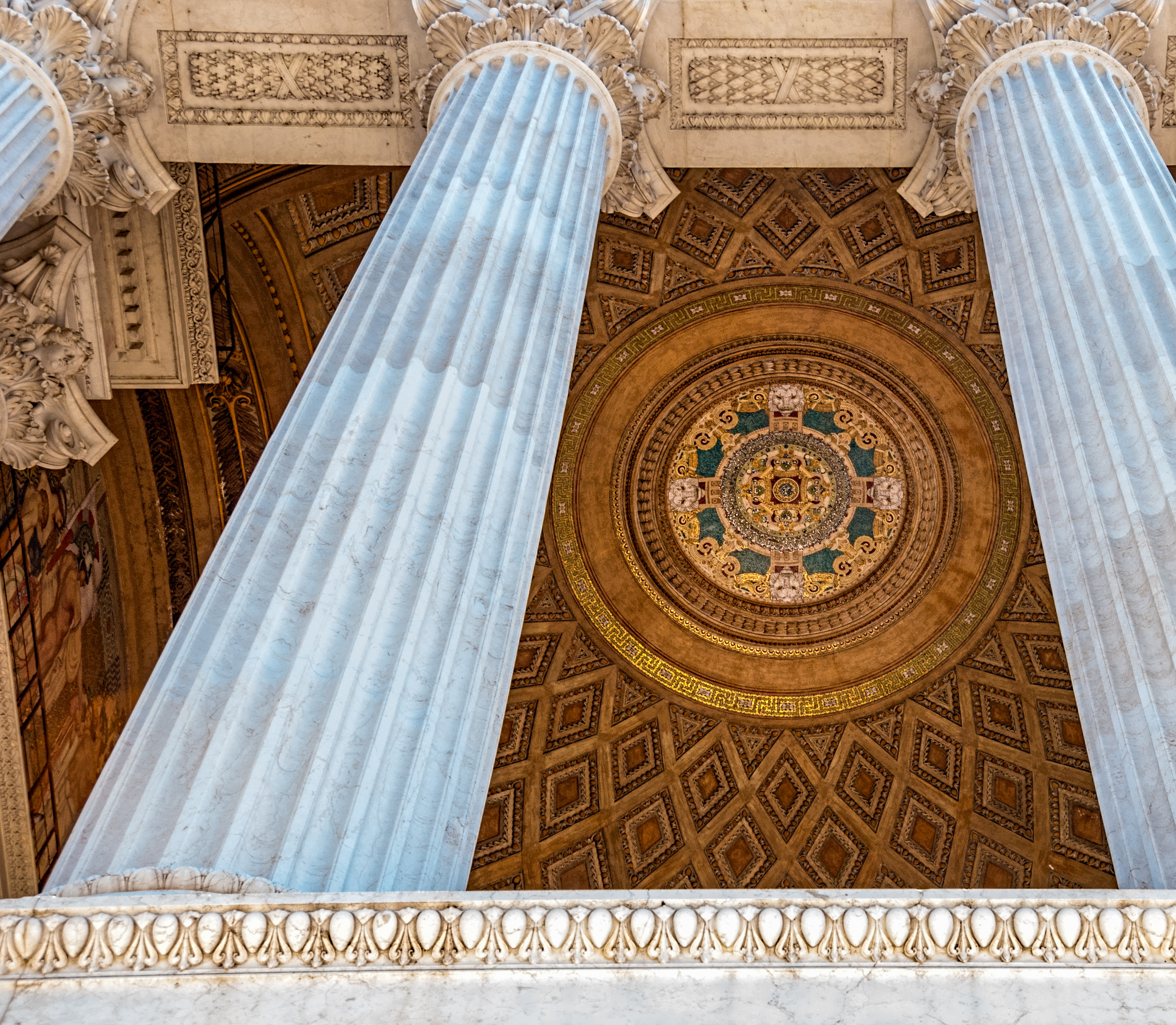 Monumento Nazionale a Vittorio Emanuele II, Rome